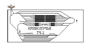 схема депо №2 Тулы